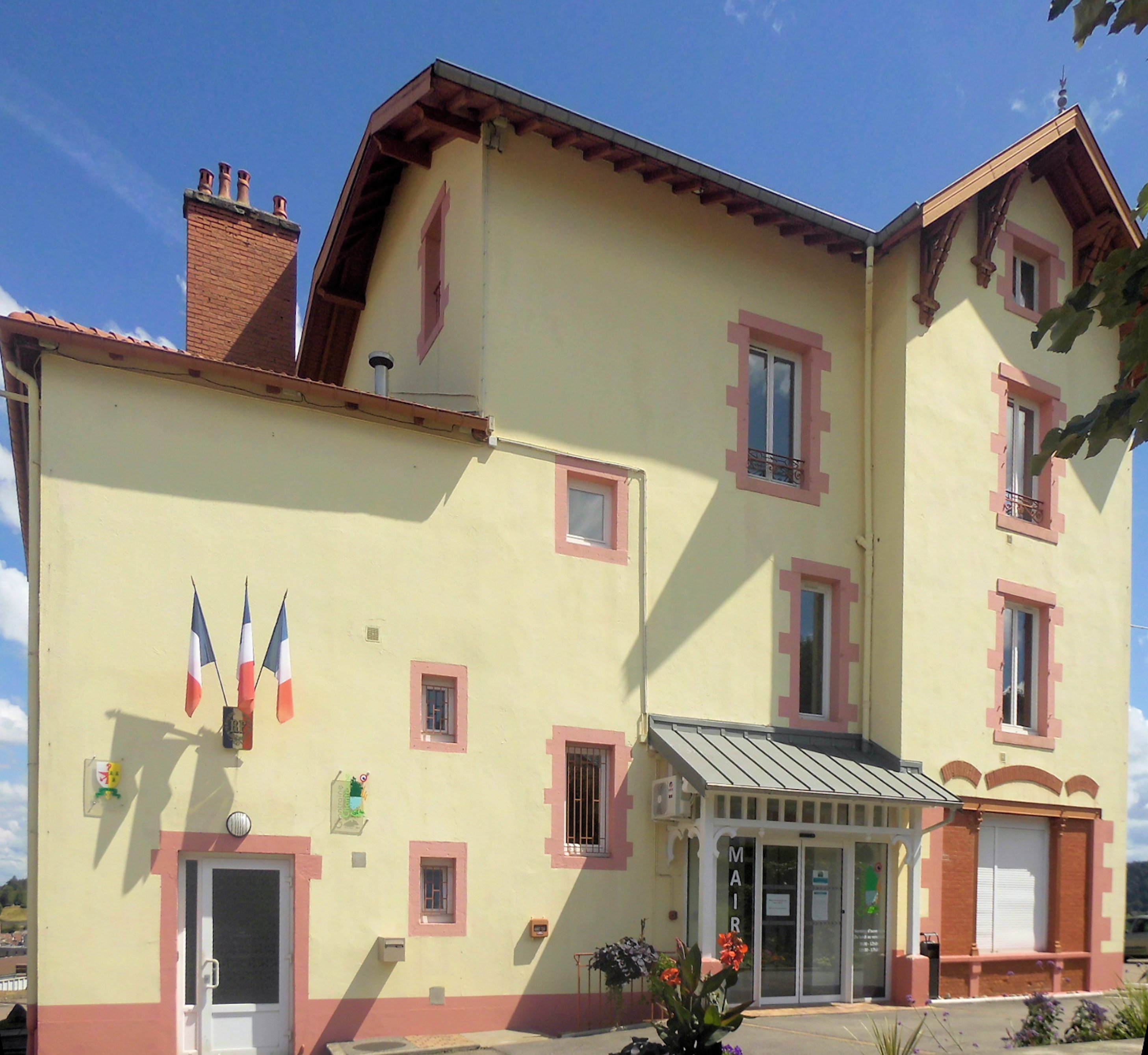 La mairie de Chantraine